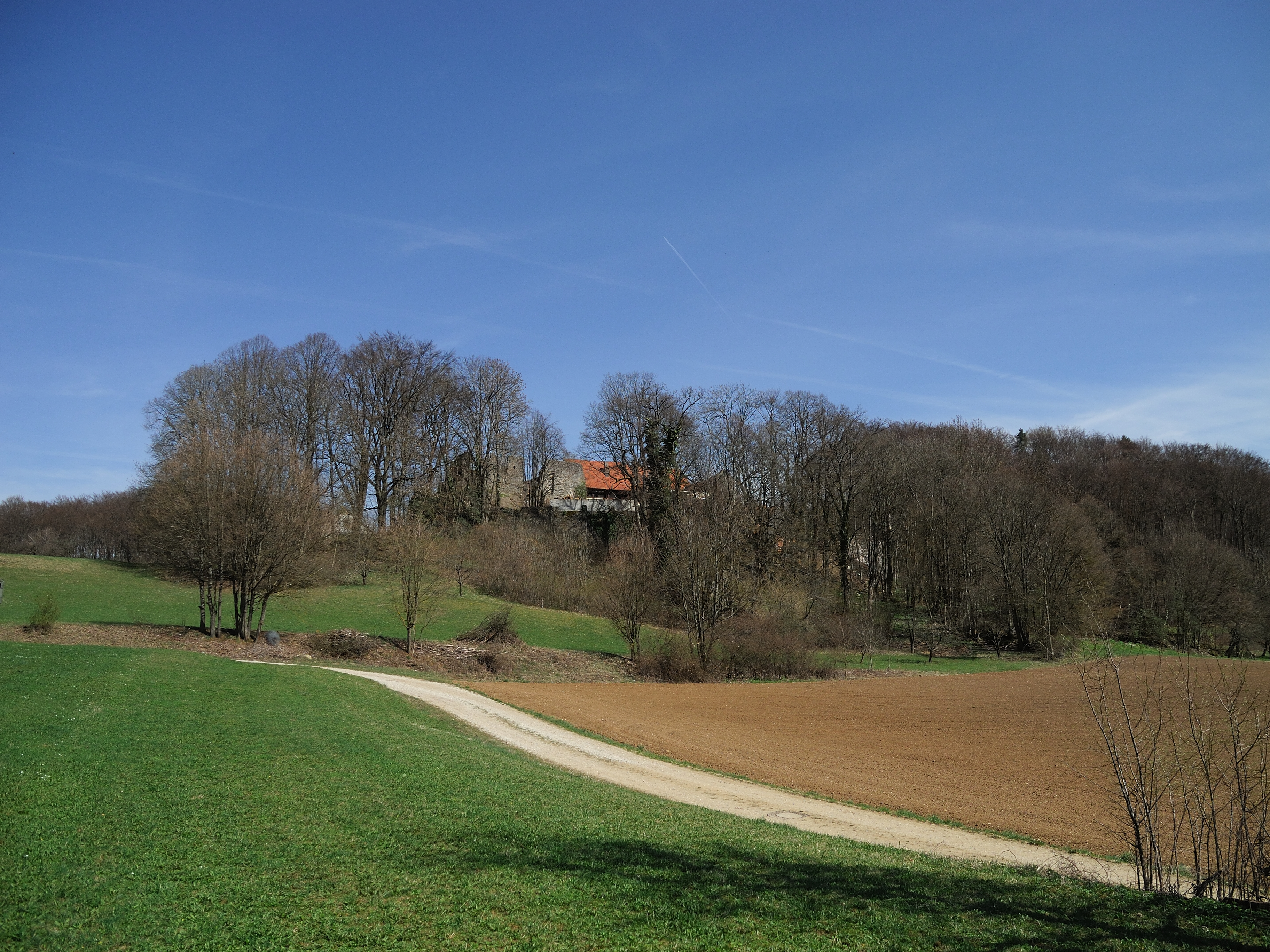 Burgruine Winterstein - Gesamtansicht von Südwesten